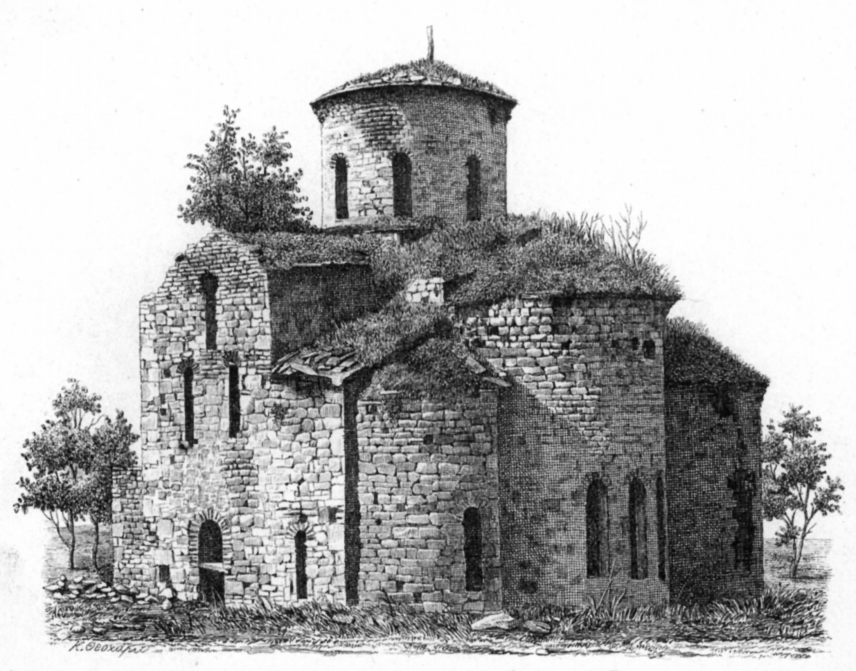 2-я древне-христианская церковь, находящ. в ущелии р. Зеленчука. Вид с юго-восточн. стор.